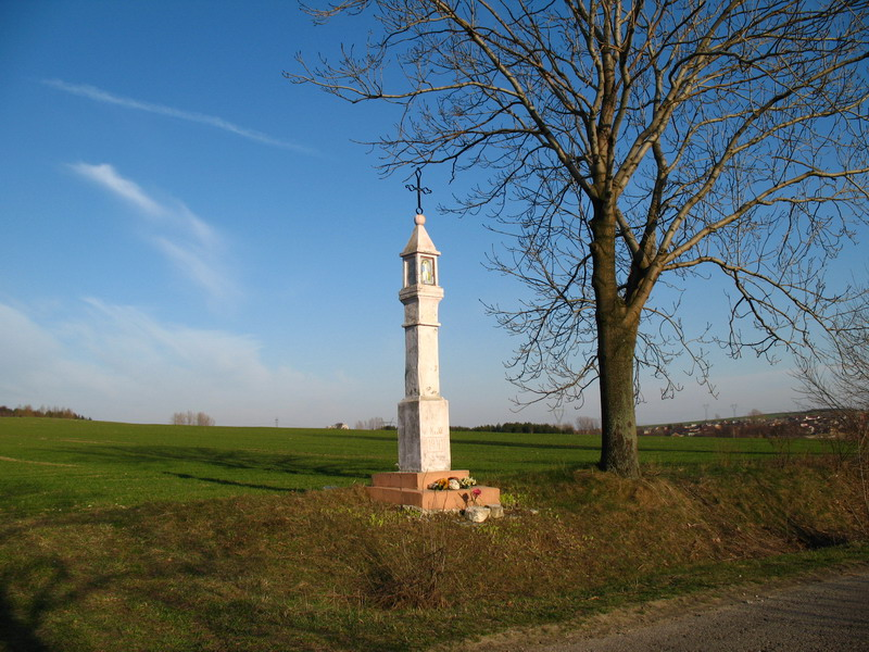 Kapliczka z 1943r przy drodze do Kromołowa w Bzowie